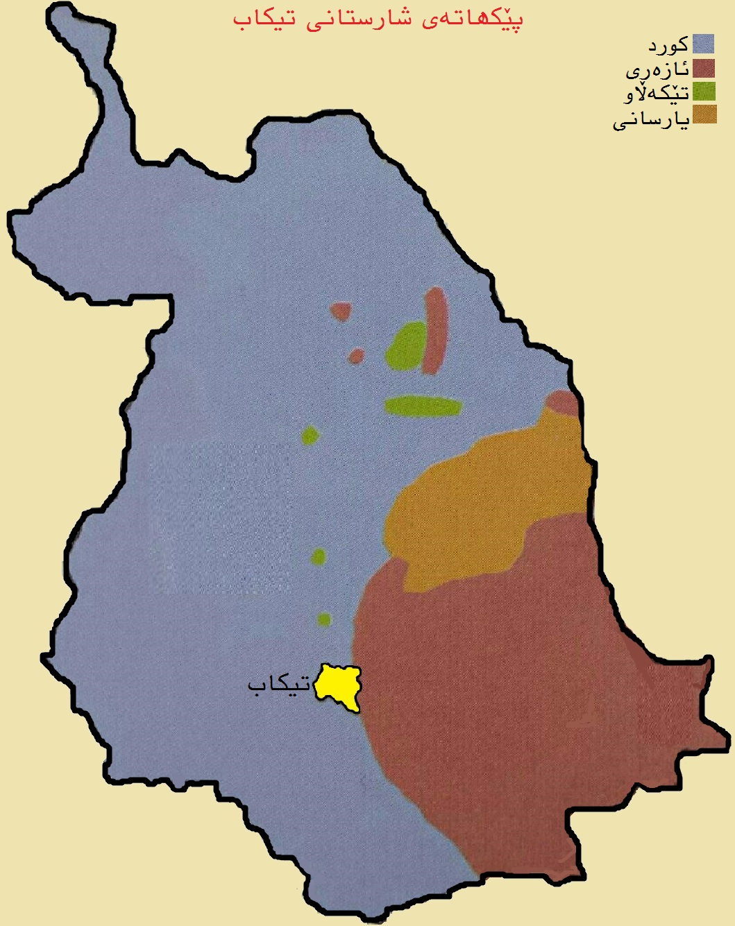 کوردی: تیکاب1